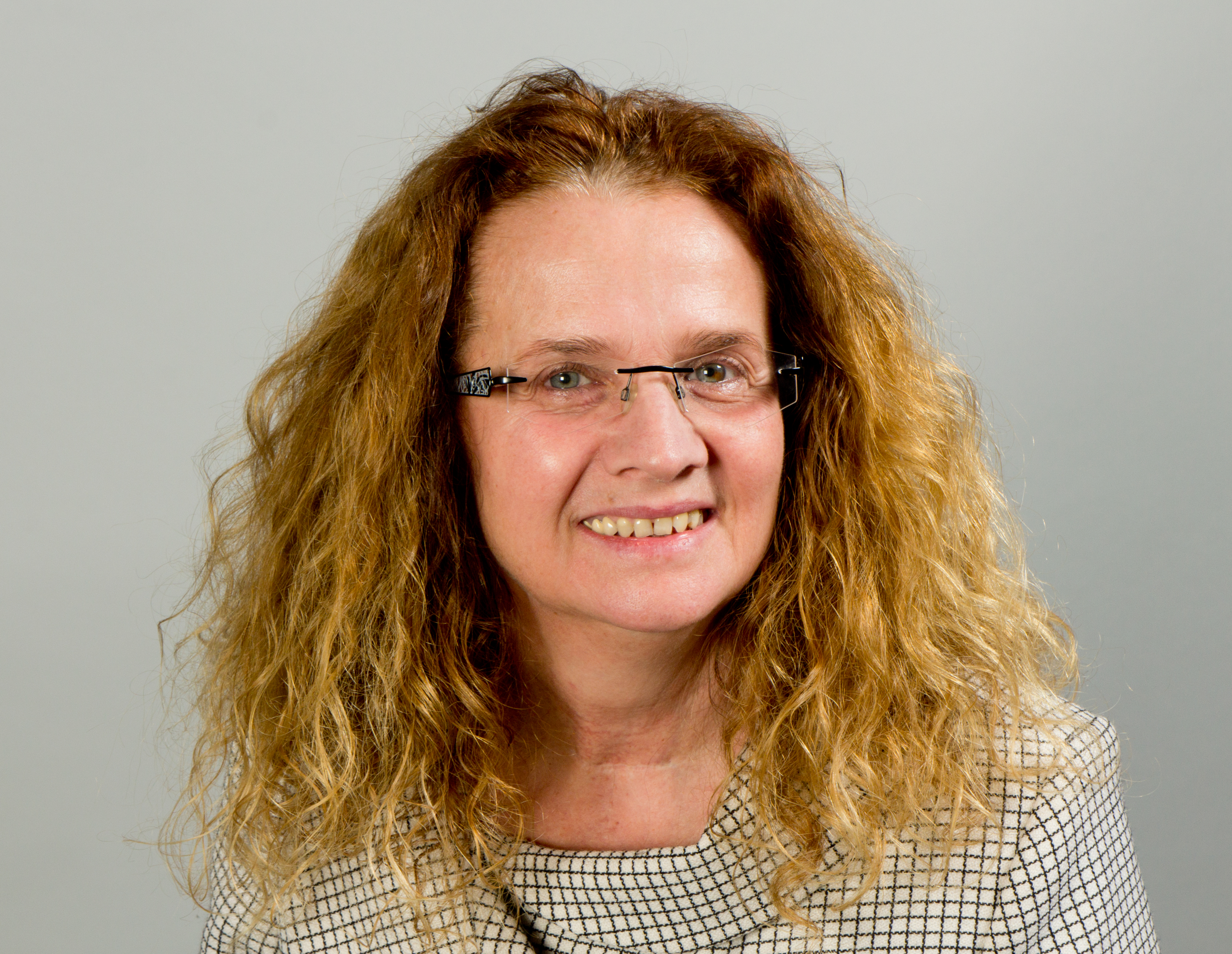 Cornelia Falken (* 12. November 1956 in Heringsdorf) ist eine deutsche Politikerin (Die Linke) und seit 2004 Mitglied des Sächsischen Landtags. Wikipedia im Landtag – Sachsen 17. bis 18. Dezember 2013 in DresdenDieses Foto wurde im Rahmen des Projektes „Wikipedia im Landtag“ erstellt. Fragen zur Nachnutzung Wenn Sie Fragen zur Nachnutzung dieses Bildes haben, können Sie sich jederzeit gern an wenden